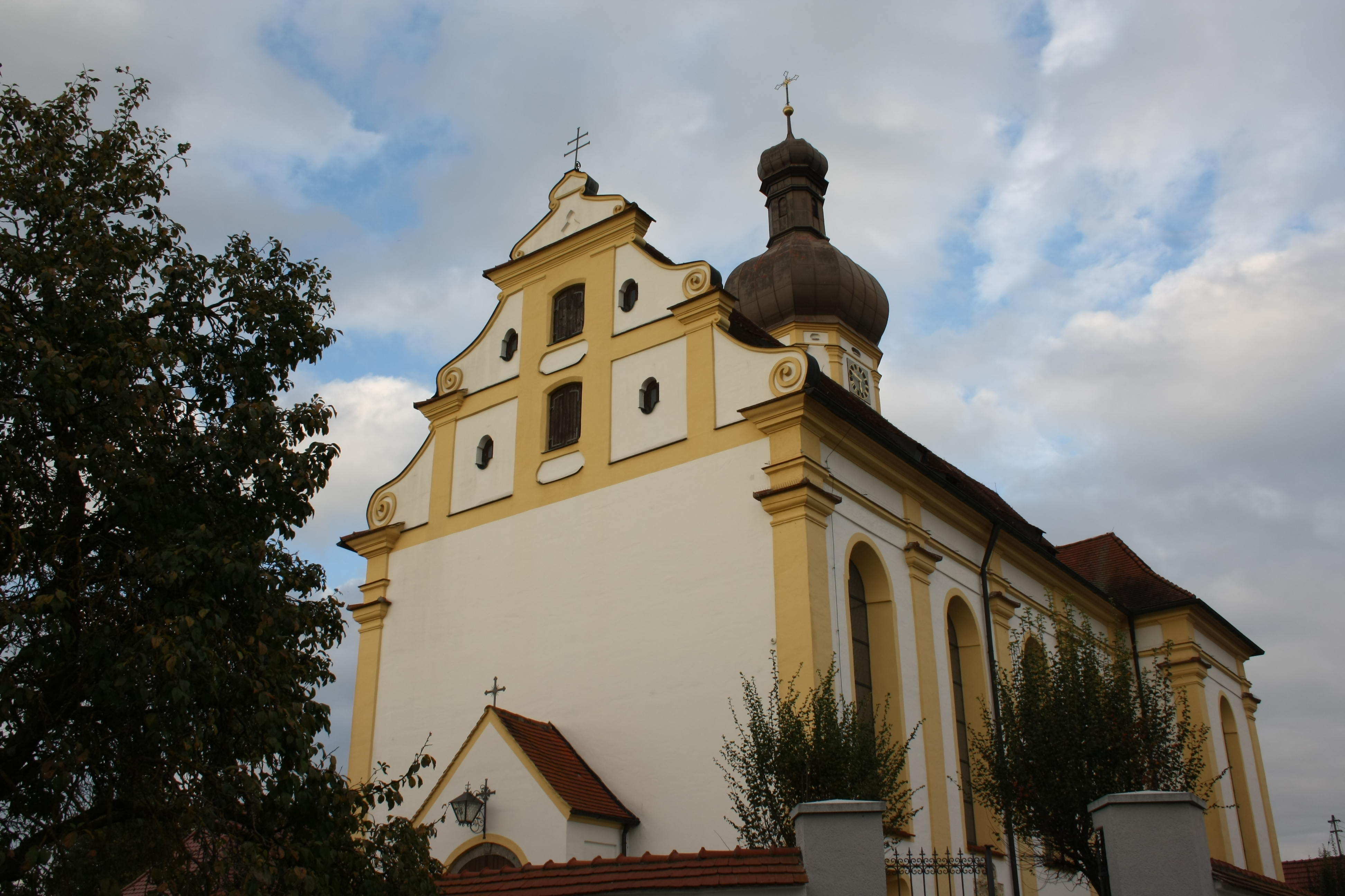 Katholische Pfarrkirche St. Ulrich und Johannes Baptist in Schwenningen im Landkreis Dillingen an der Donau, Ansicht von Südwesten, Westfassade und Turm mit Doppelzwiebelhaube